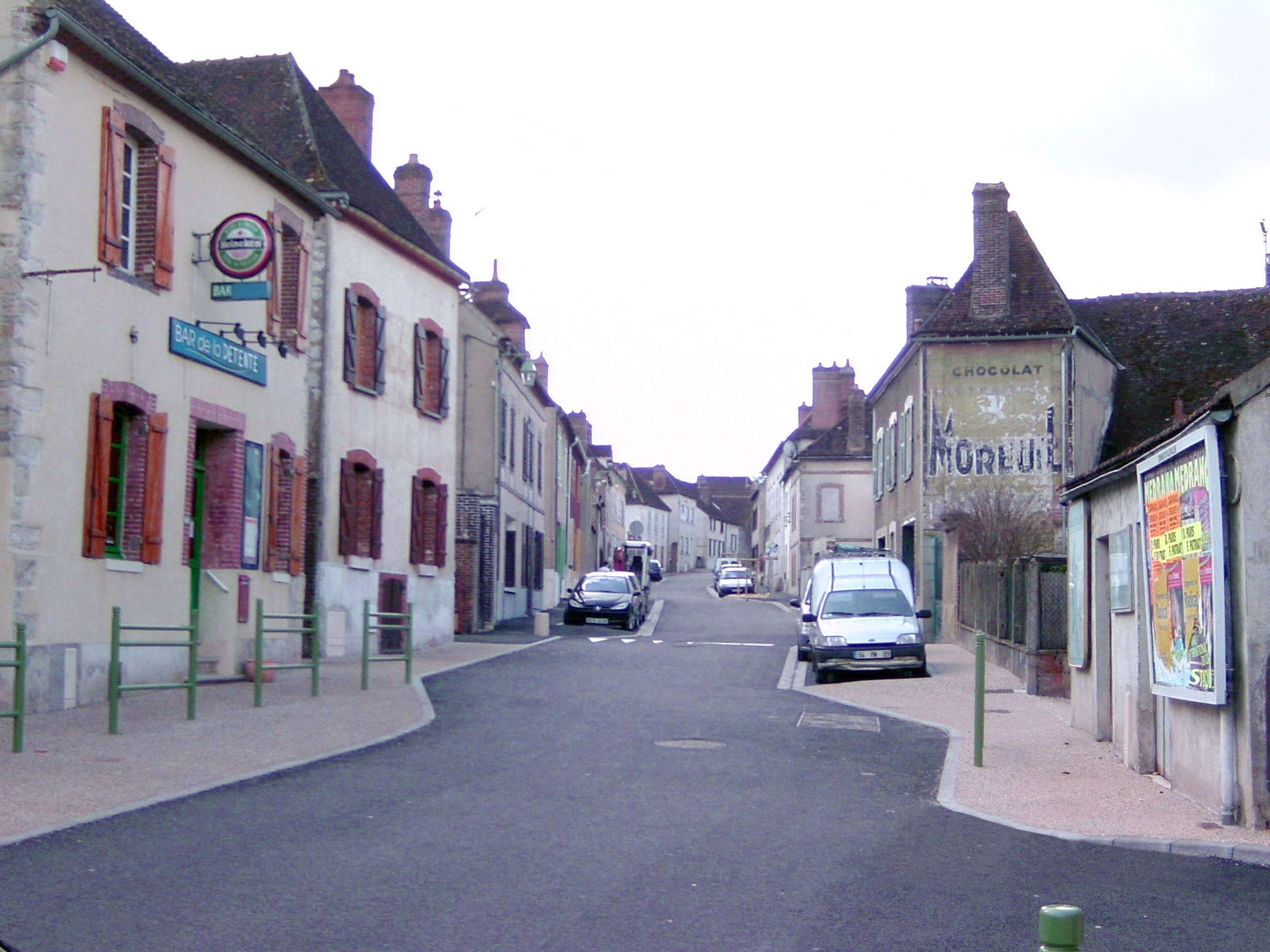 Vue de l'ancienne N6 avec publicité